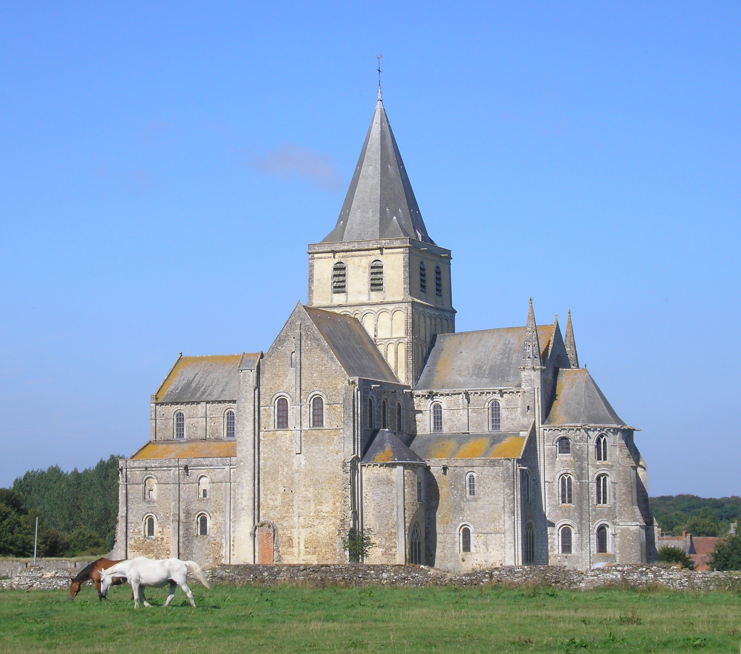 Cerisy-la-Forêt (Normandie, France). L’abbaye Saint-Vigor.